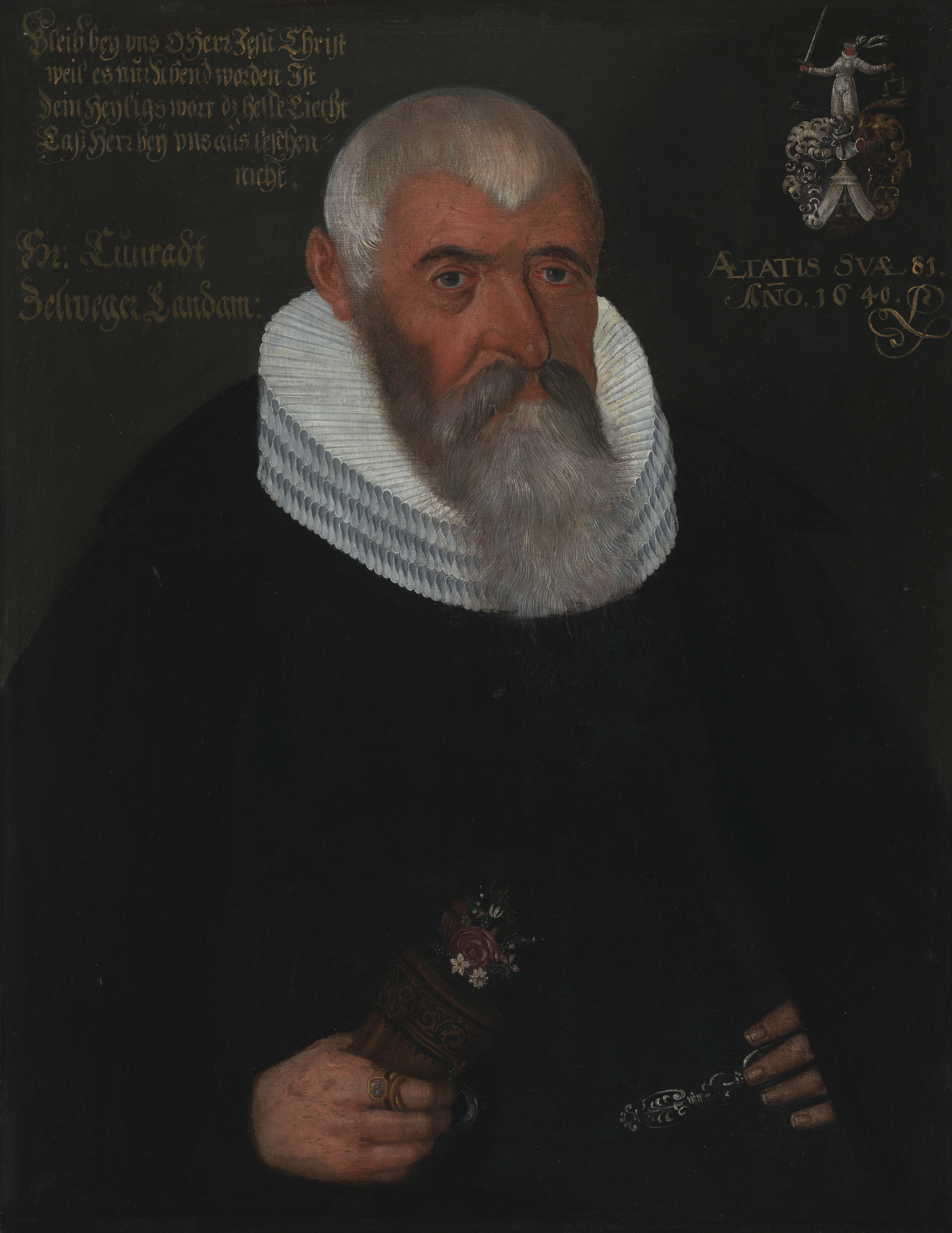 4. Landammann von Appenzell Ausserrhoden, Brustbildnis